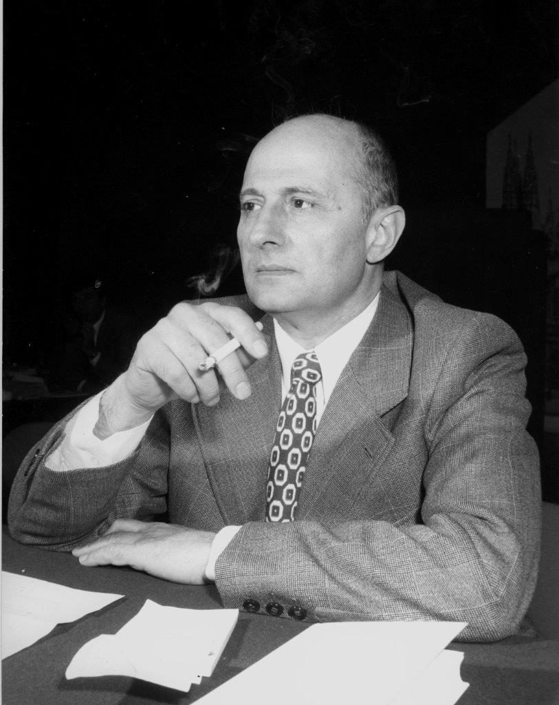 Ritratto di Mario Pomilio, primi anni '70